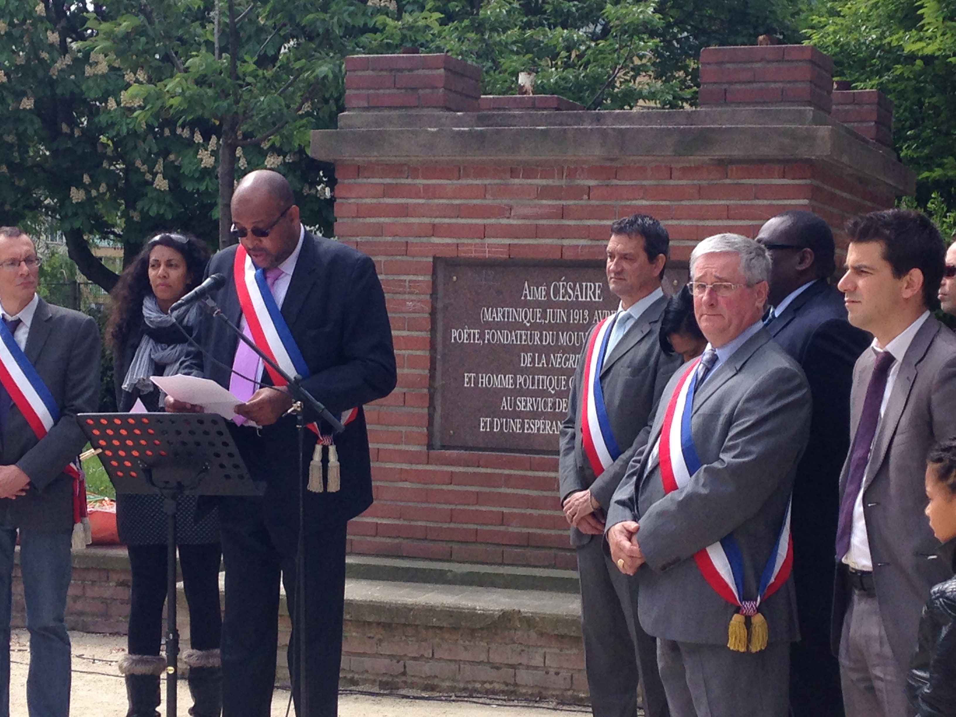 Cérémonie à Pierrefitte-sur-Seine (place Nelson mandela) lors de la journée commémorative du souvenir de l'esclavage et de son abolition, le dimanche 12 mai 2013. Au micro, Georges Merlot, maire-adjoint. A droite, Michel Fourcade maire de Pierrefitte, et Mathieu Hanotin, député.